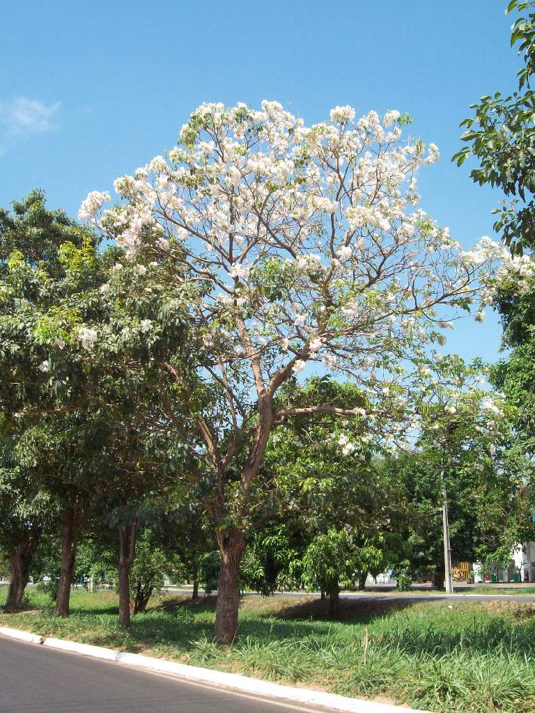 Ipê branco as margens da rodovia Belém Brasília, em Imperatriz Maranhão.